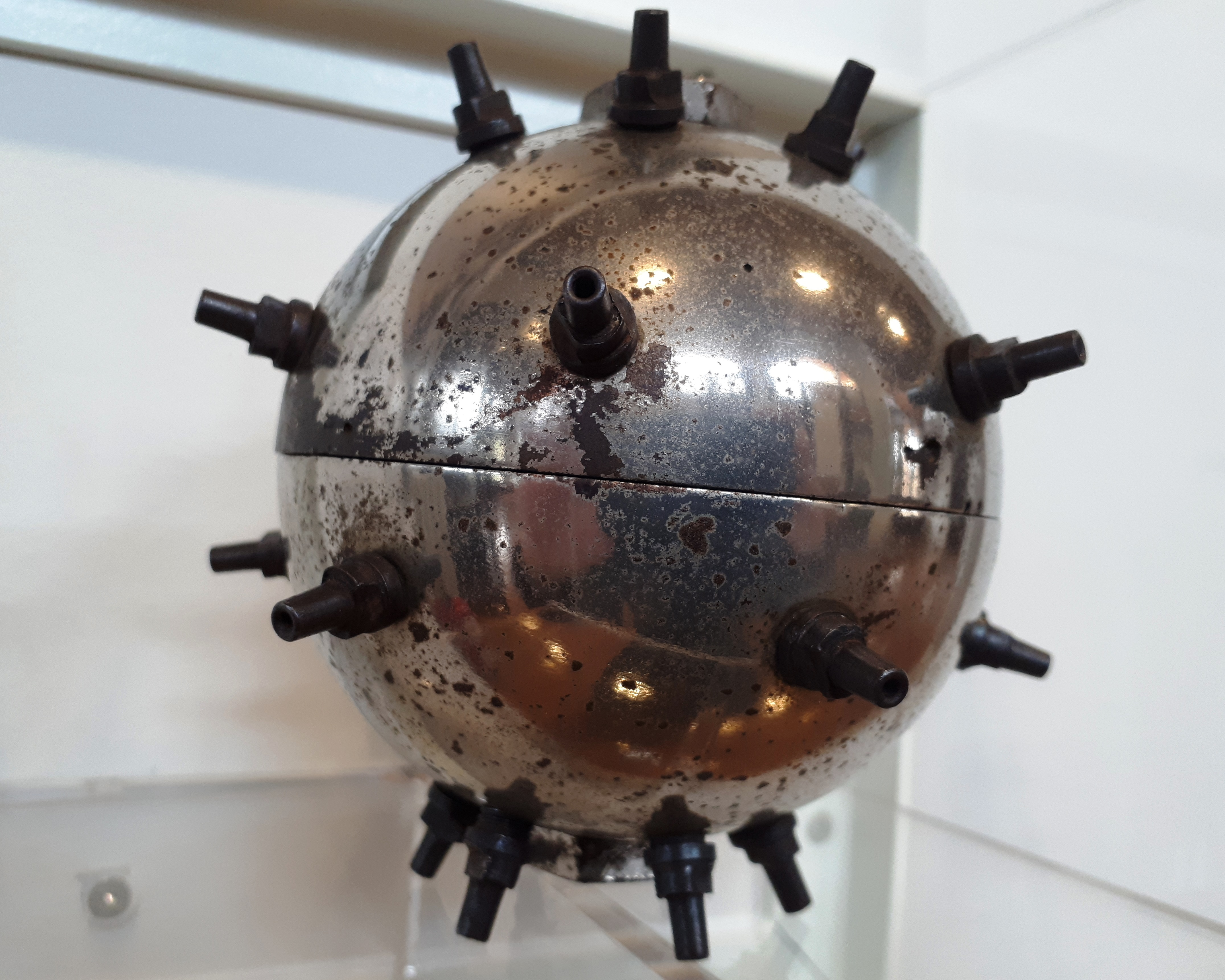 La bomba Orsini conservada al Museu d'Història de Barcelona MUHBA